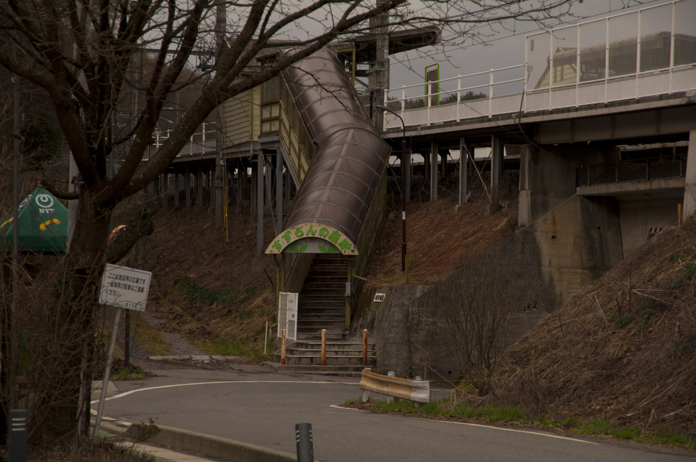 東日本旅客鉄道中央本線すずらんの里駅上り線